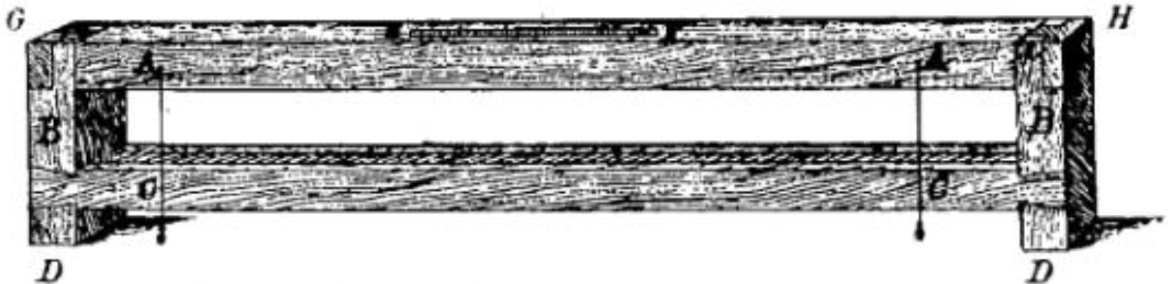 Reconstitution par Pierre Perrault (1611-1680) du chorobate romain, instrument servant à vérifier la pente, notamment dans la réalisation des aqueducs.